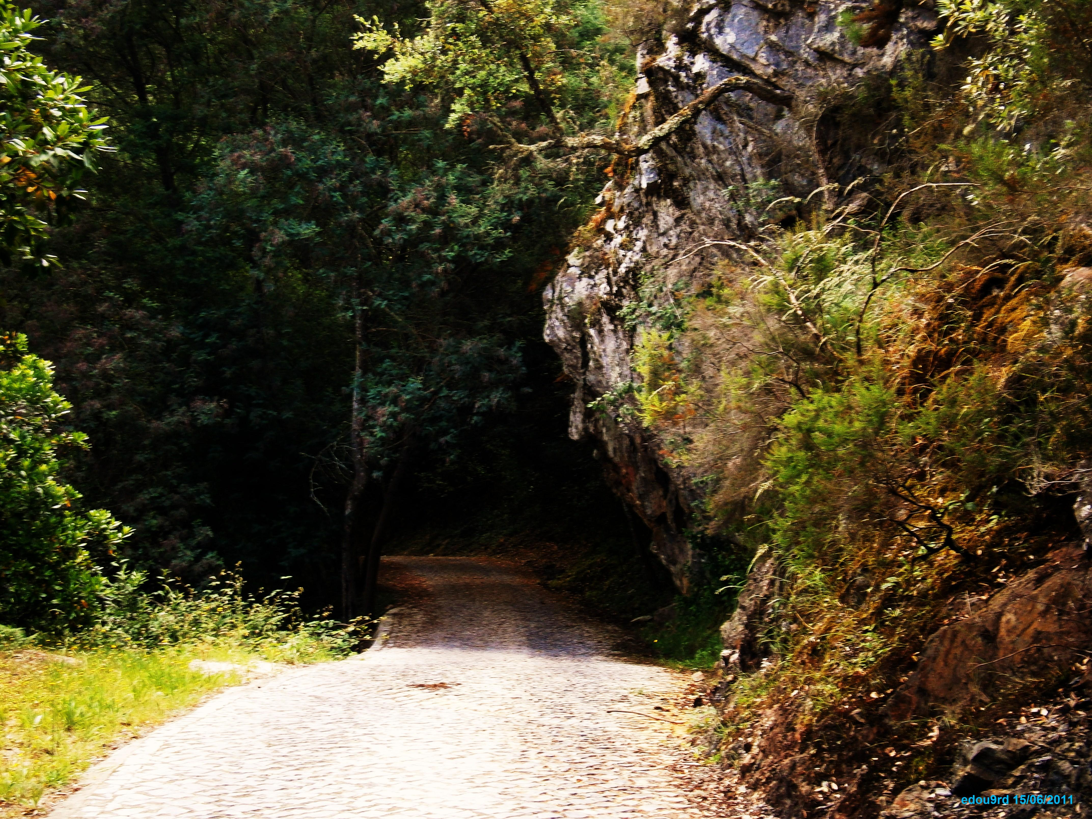 Praia Fluvial das Fragas de S. Simão